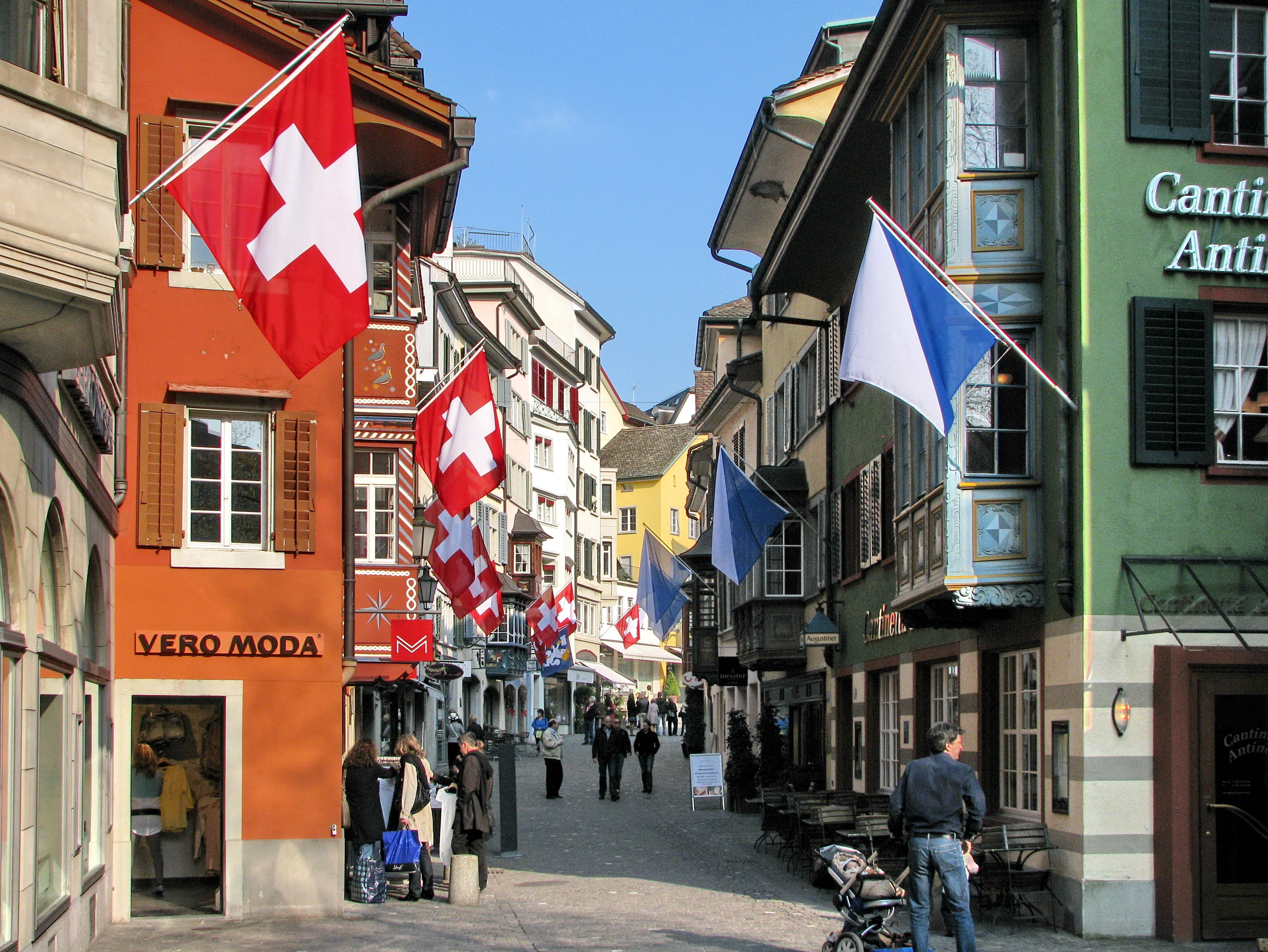 Augustinergasse in Lindenhof quarter, Zürich (Switzerland)